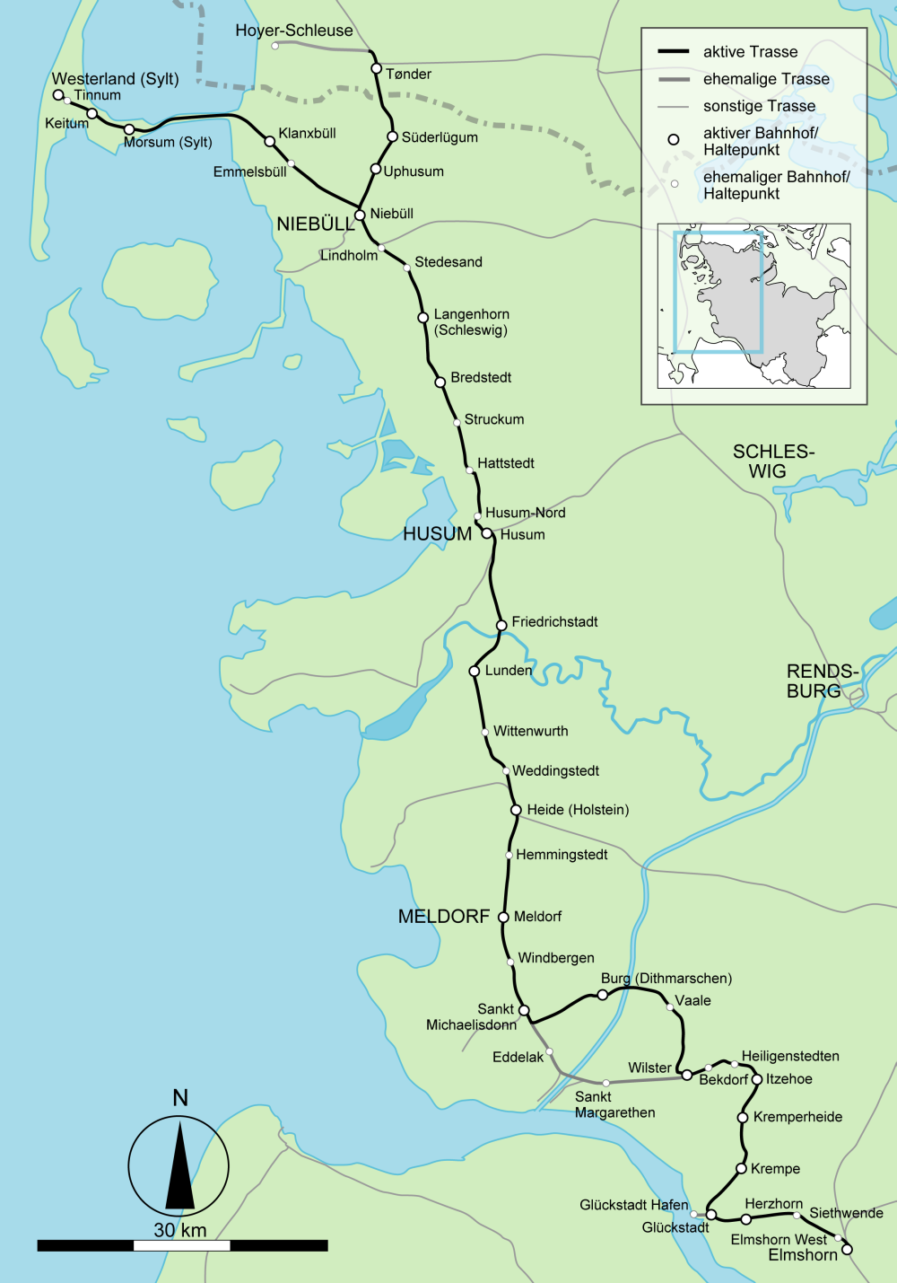 Marschbahn